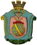 Brasão da cidade do rio de janeiro em 1856.